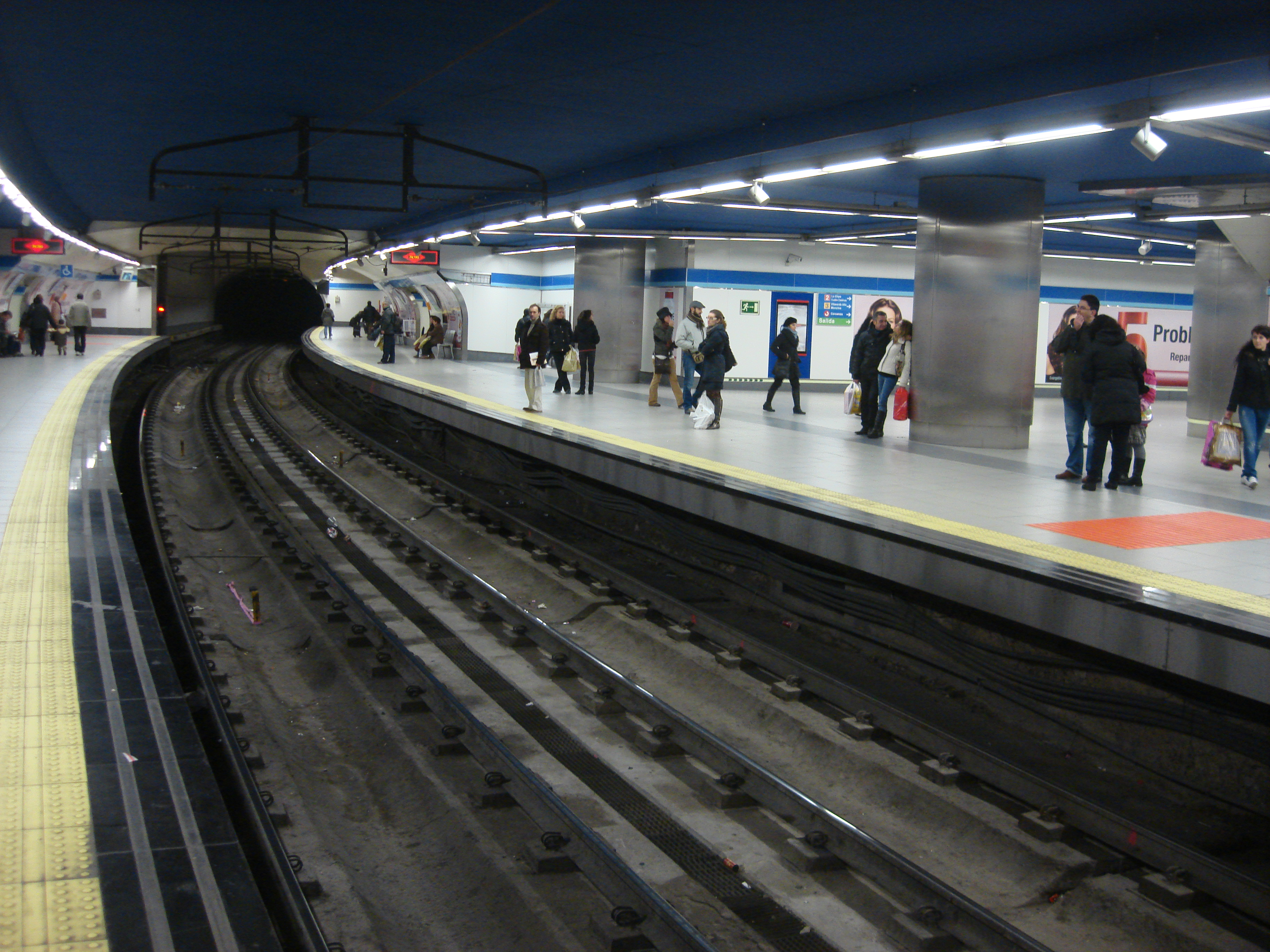 Own work